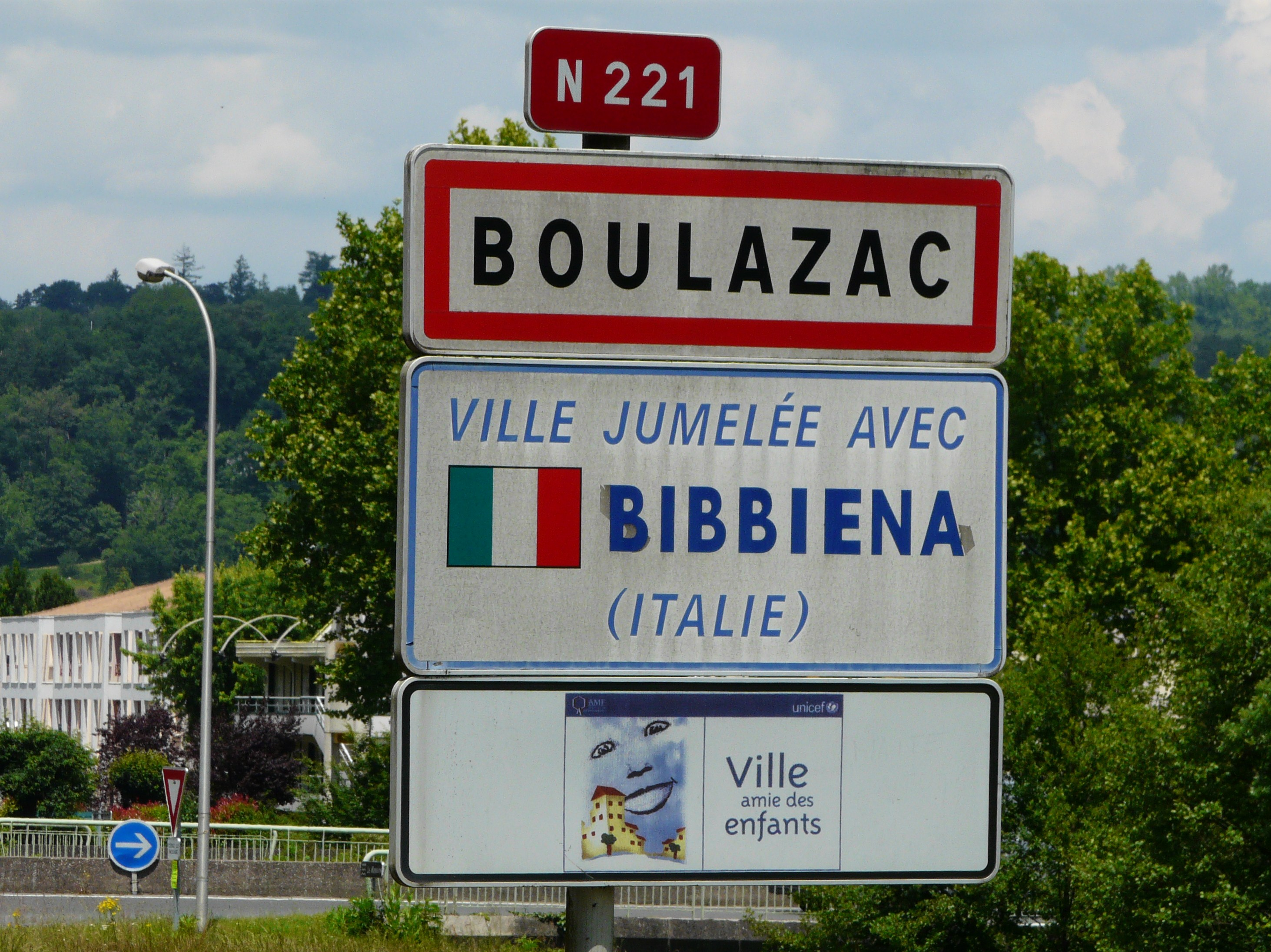 Panneau de jumelage de Boulazac, Dordogne, France.